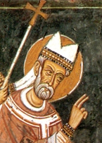 Pope Sylvester I